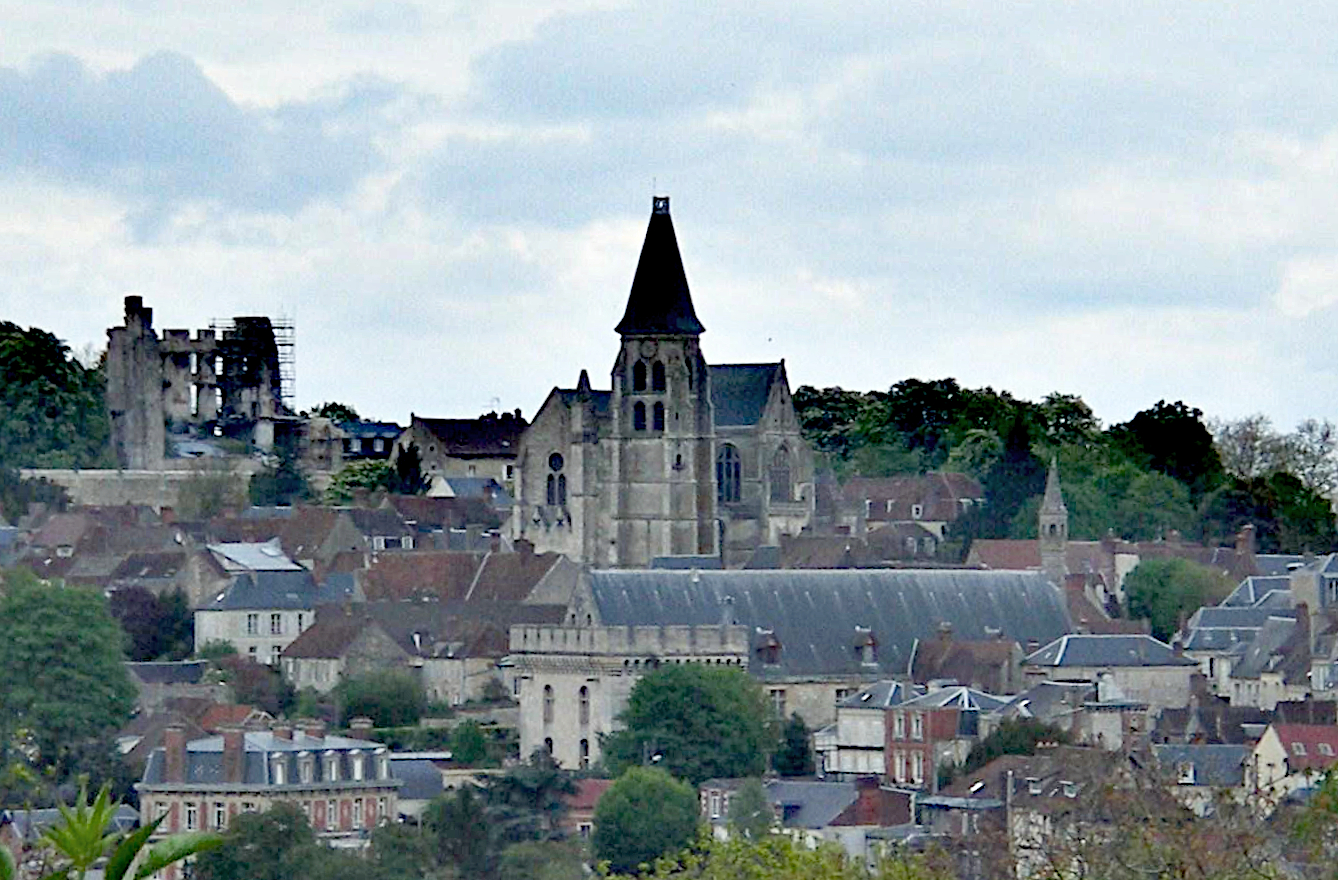 Vue Générale de Clermont (Oise)